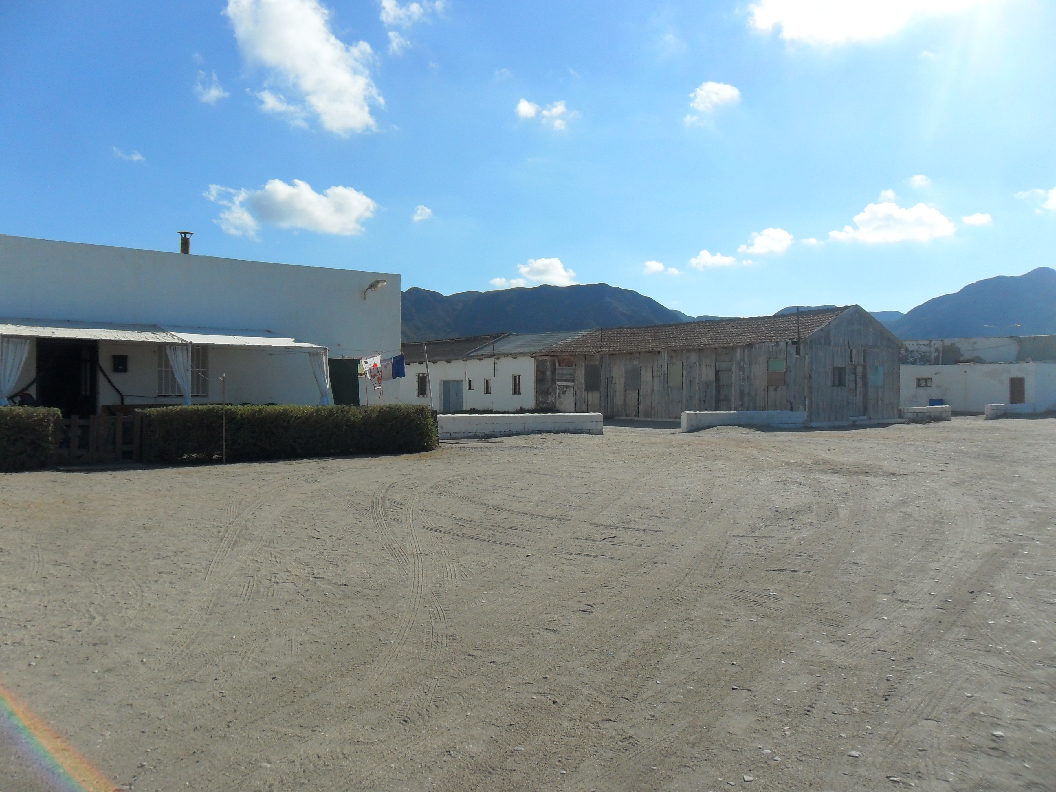 Casas en la Almadraba